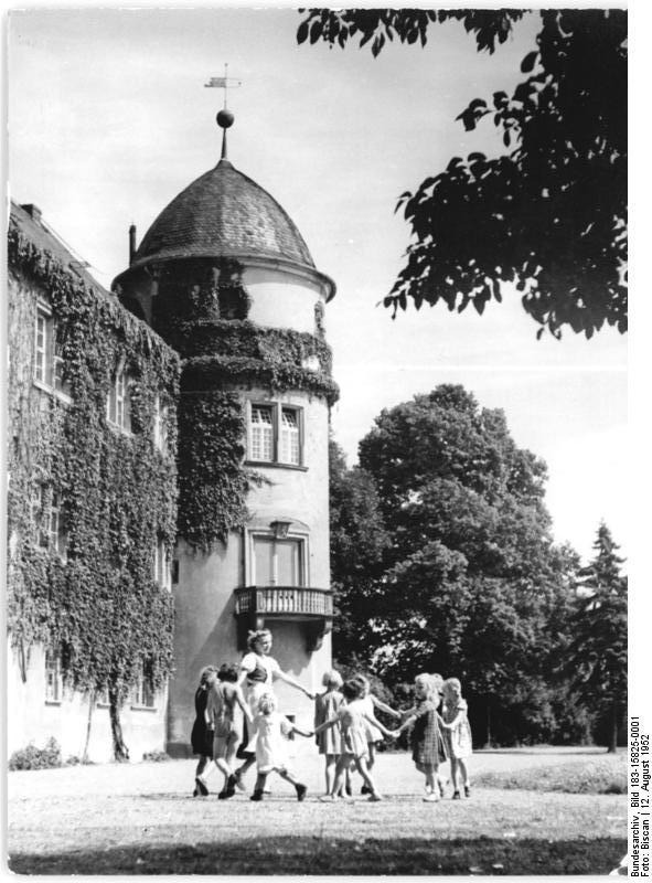 Hadmersleben, Kindergartengruppe im Schloßpark Zentralbild Biscan 12.8.1952 Kindergarten im Schloss Germersleben (Sachsen-Anhalt) Während die Bauern und Bäuerinnen, die Traktoristen der Mas und die Landarbeiter des Volksgutes Großgermersleben bei Hadmersleben die Friedensernte einbringen, befinden sich ihre Kinder in guter Obhut. Der im Schloss eingerichtete Kindergarten hat besonders jetzt in der Erntezeit grosse Bedeutung. Die Eltern wissen, dass die Kinder dort gut aufgehoben sind, fröhliche Spiele treiben und gut verpflegt werden. Das Schloss, das früher der Sitz eines Junkers war und von Bauern und Landarbeitern nicht betreten werden durfte, gehört jetzt dem Volk und kommt allen zugute. UBz: Ringelreihe im Schloßpark. Kinder von Bauern und Landarbeitern beim fröhlichen Spiel. Im Hintergrund das Schloß, das früher dem Gutsbesitzer von Byern und zuleltzt dem Junker von Kotze gehörte.